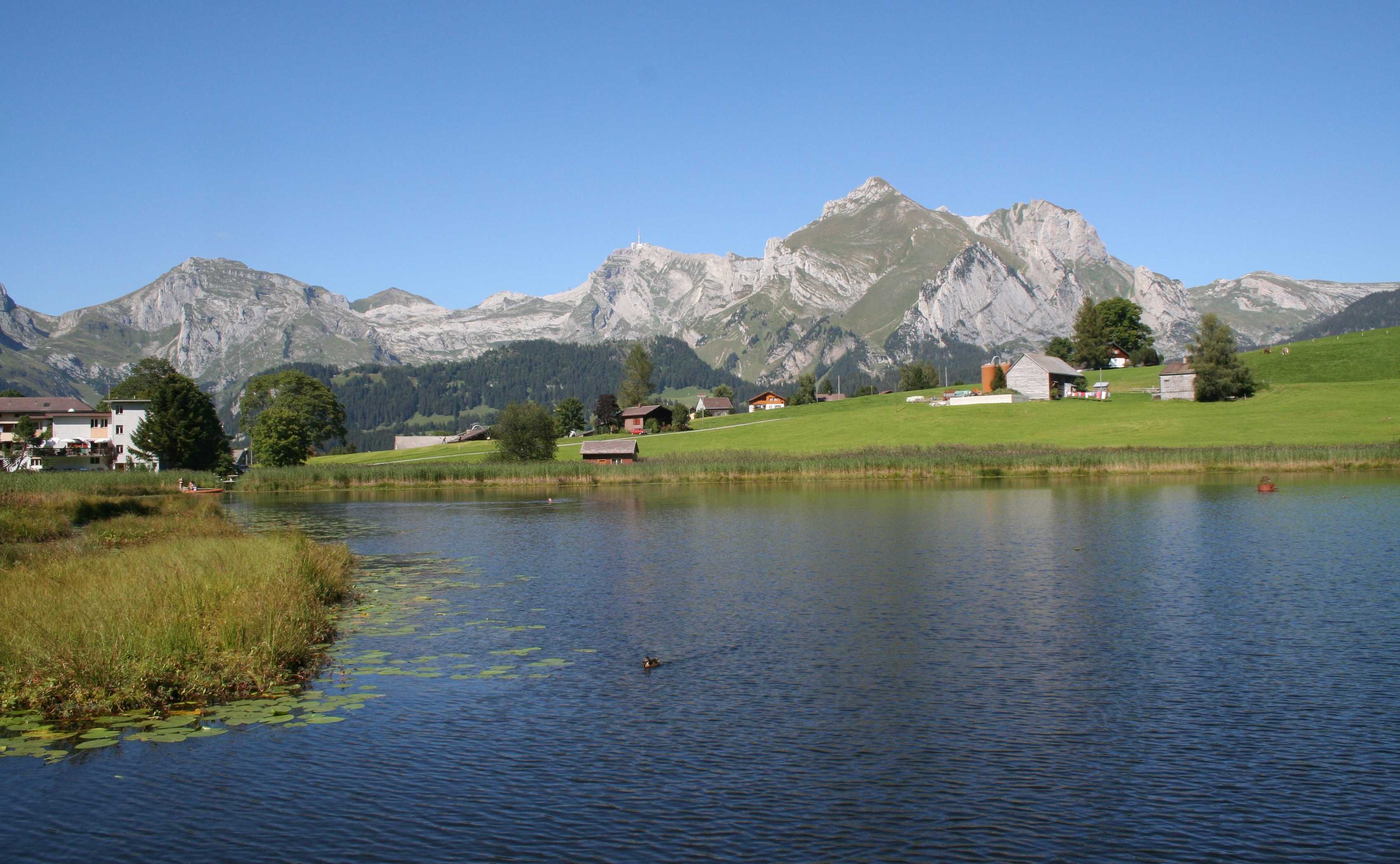 Schwendisee oberhalb Wildhaus SG. Im Hintergrund Säntis und Schafberg